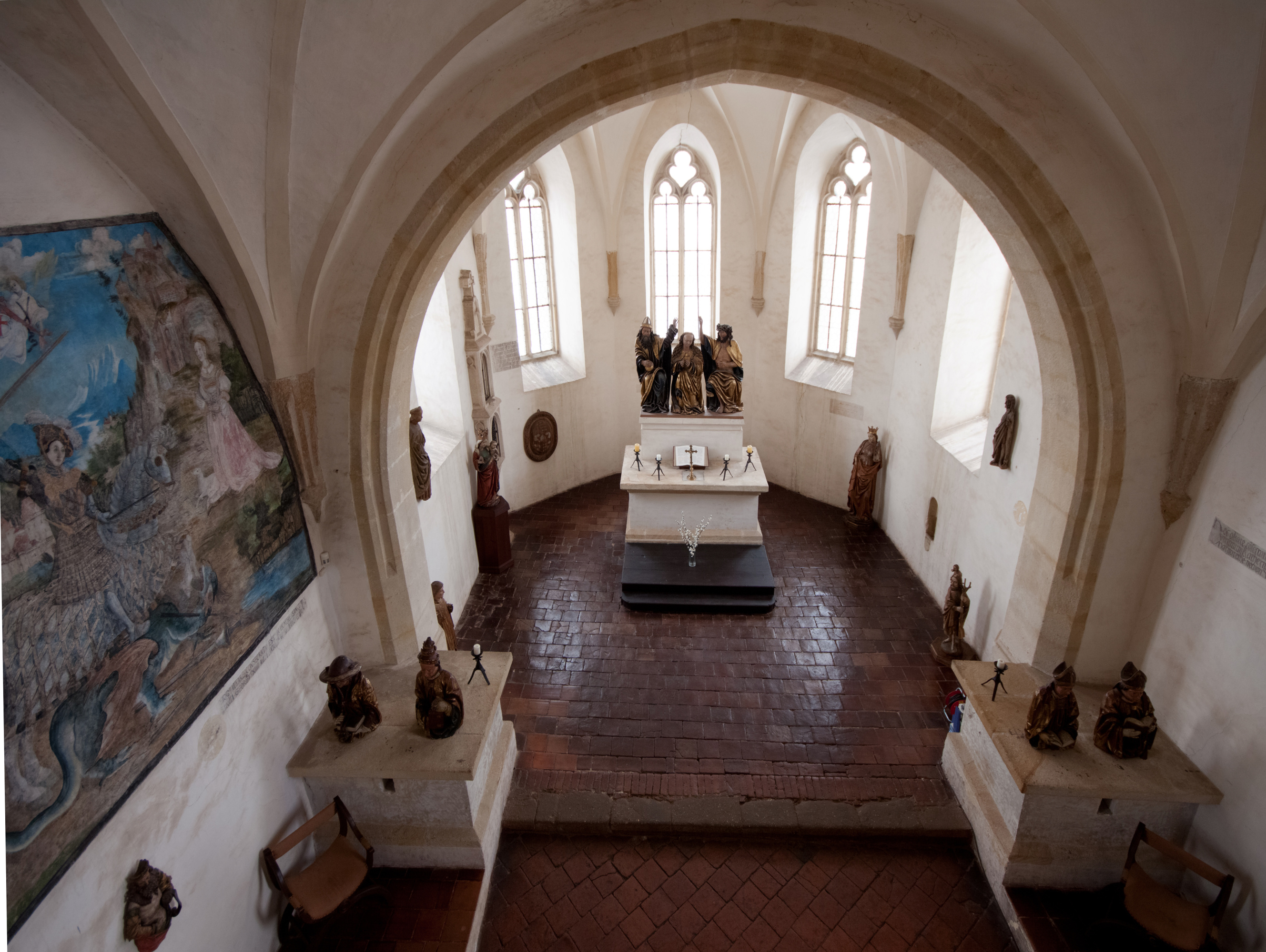 Hrad Švihov, Švihov.